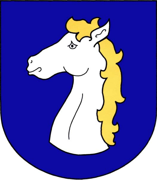 Znak obce Konárovice.